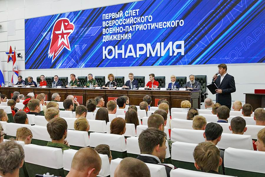 1-й слёт всероссийского военно-патриотического общественного движения «Юнармия» в парке «Патриот»